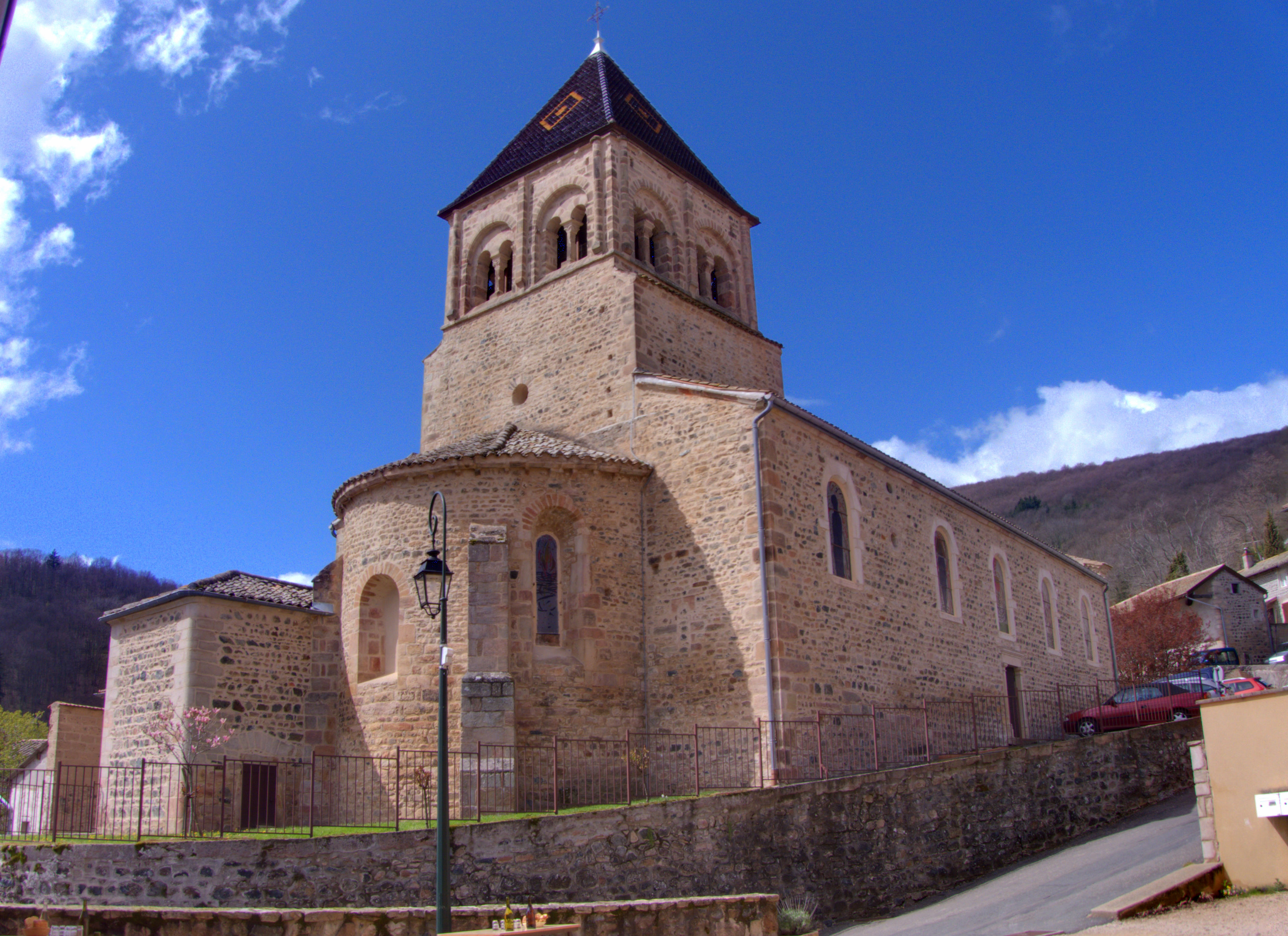 L'église de Vauxrenard.